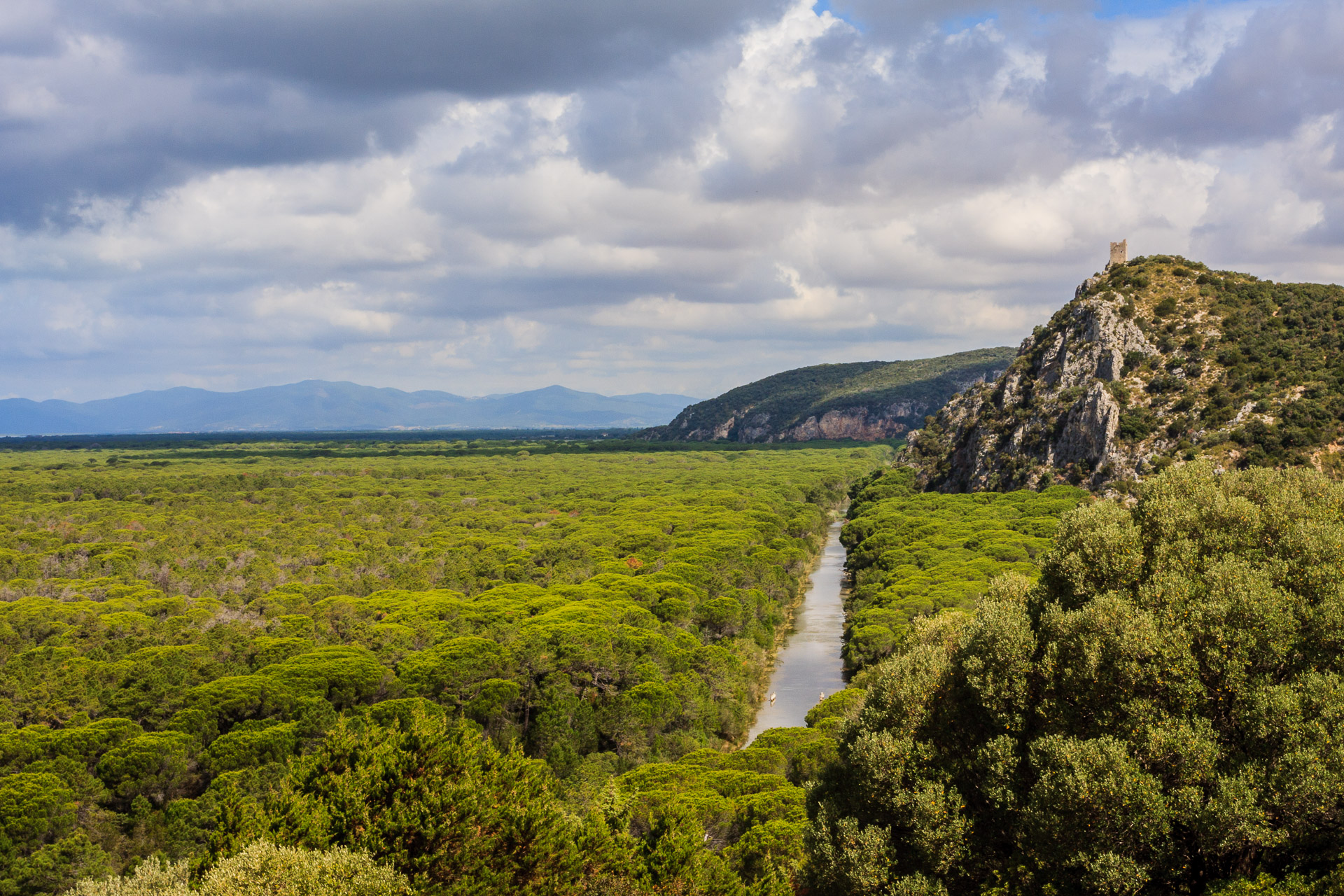 Panorama dalla torre Torre di Castelmarino (XII secolo), una delle prime torri costiere costruite a difesa del territorio.